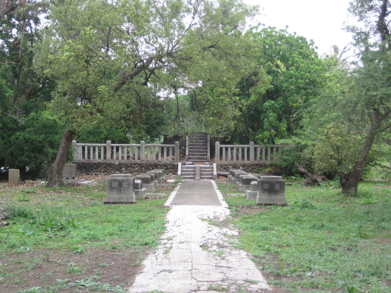 三崁店神社遺跡。